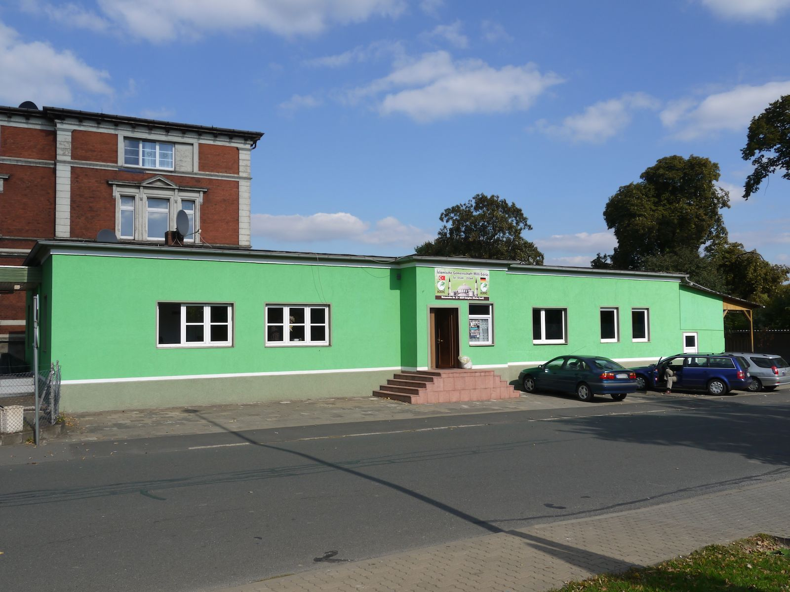 Treffpunkt der Islamischen Gemeinschaft Milli Görüs (IGMG) in Watenstedt